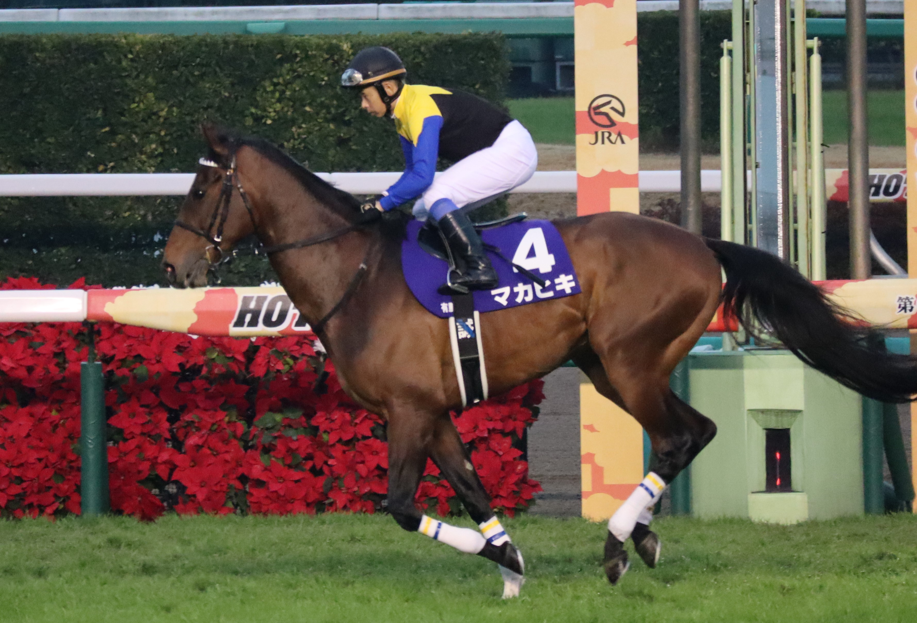 第63回有馬記念出走時